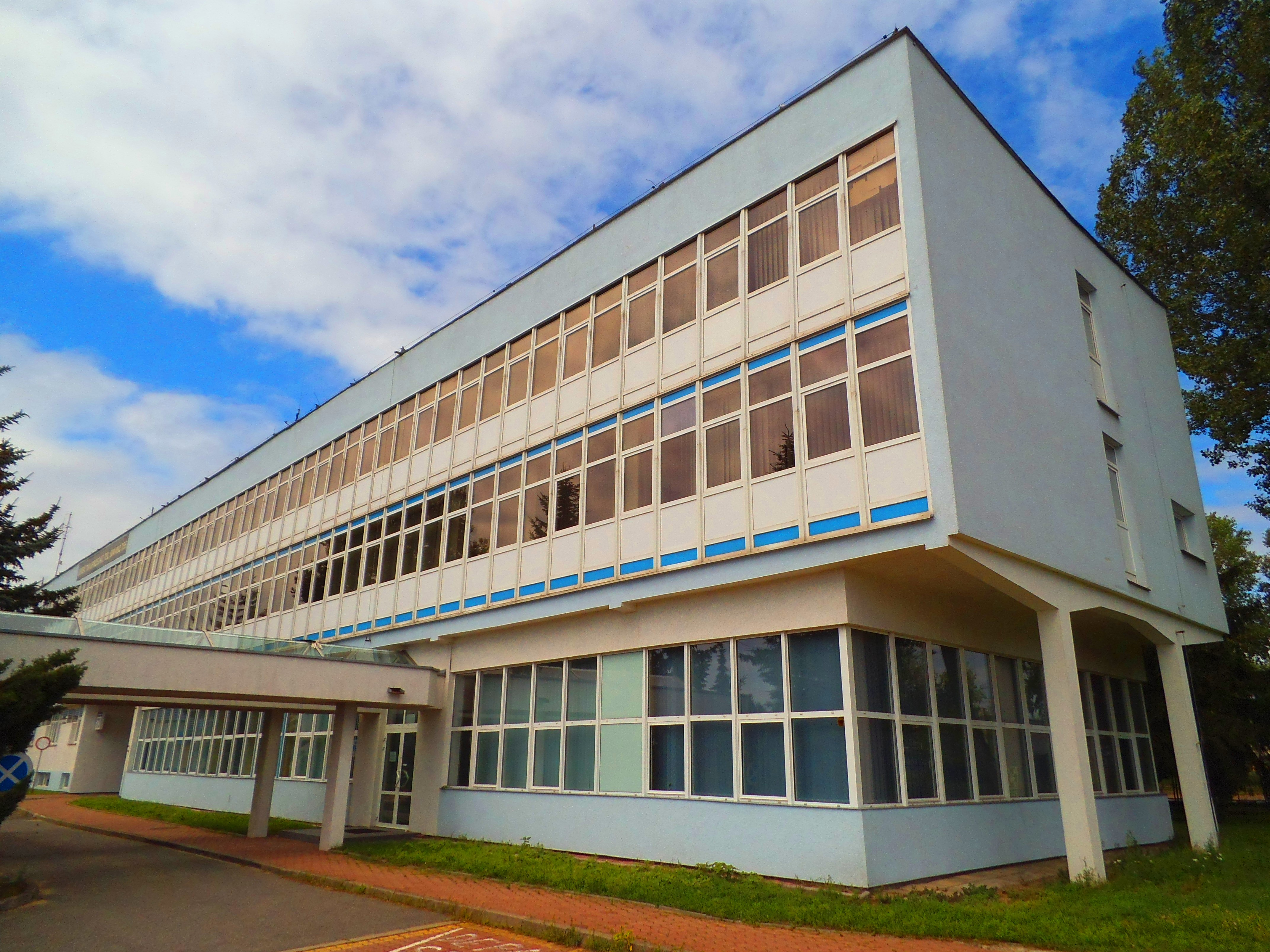 Dawny biurowiec Elany w Toruniu (stan z 2016 roku)